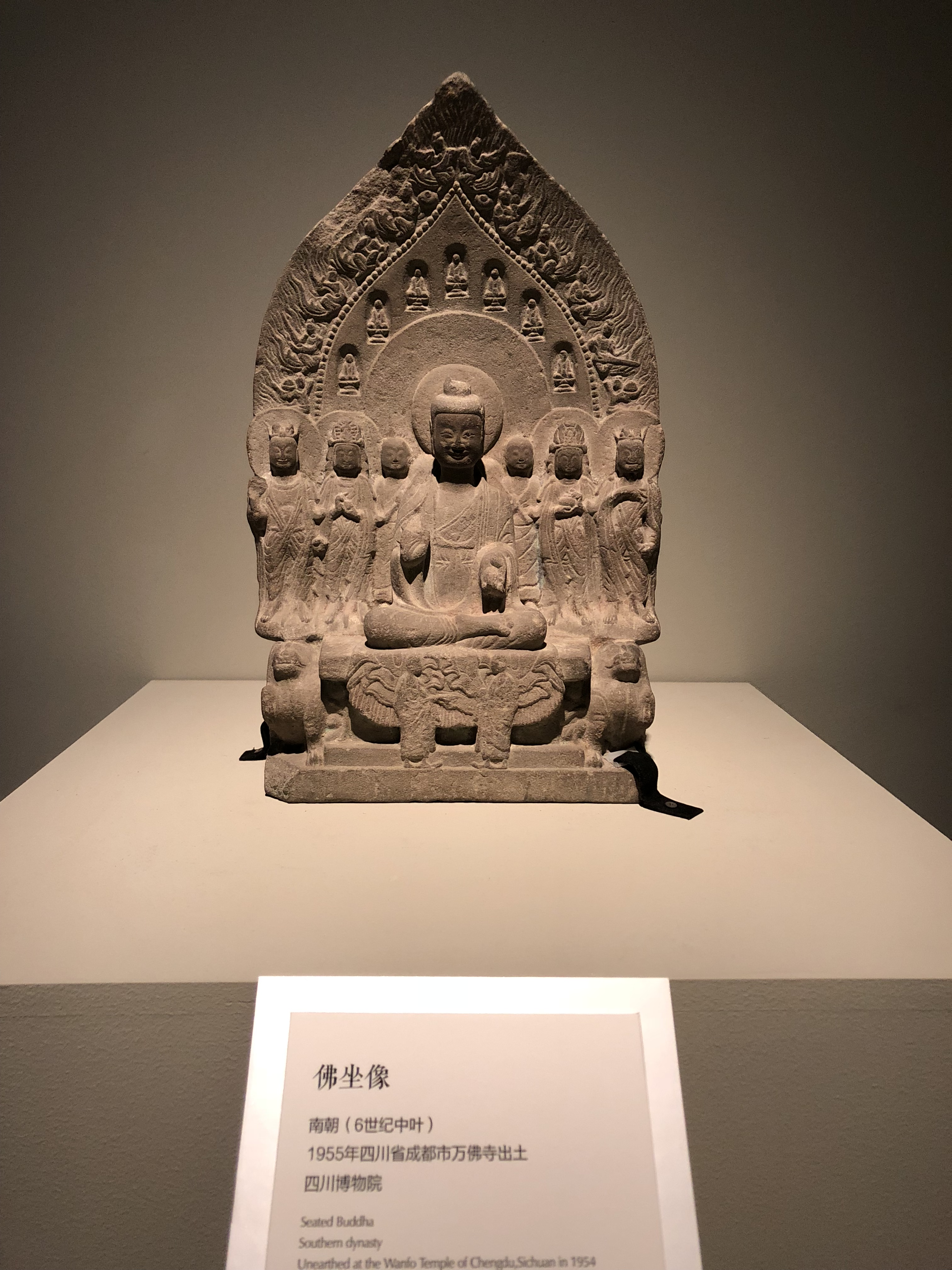 中文（台灣）: 四川省博物院館藏文物